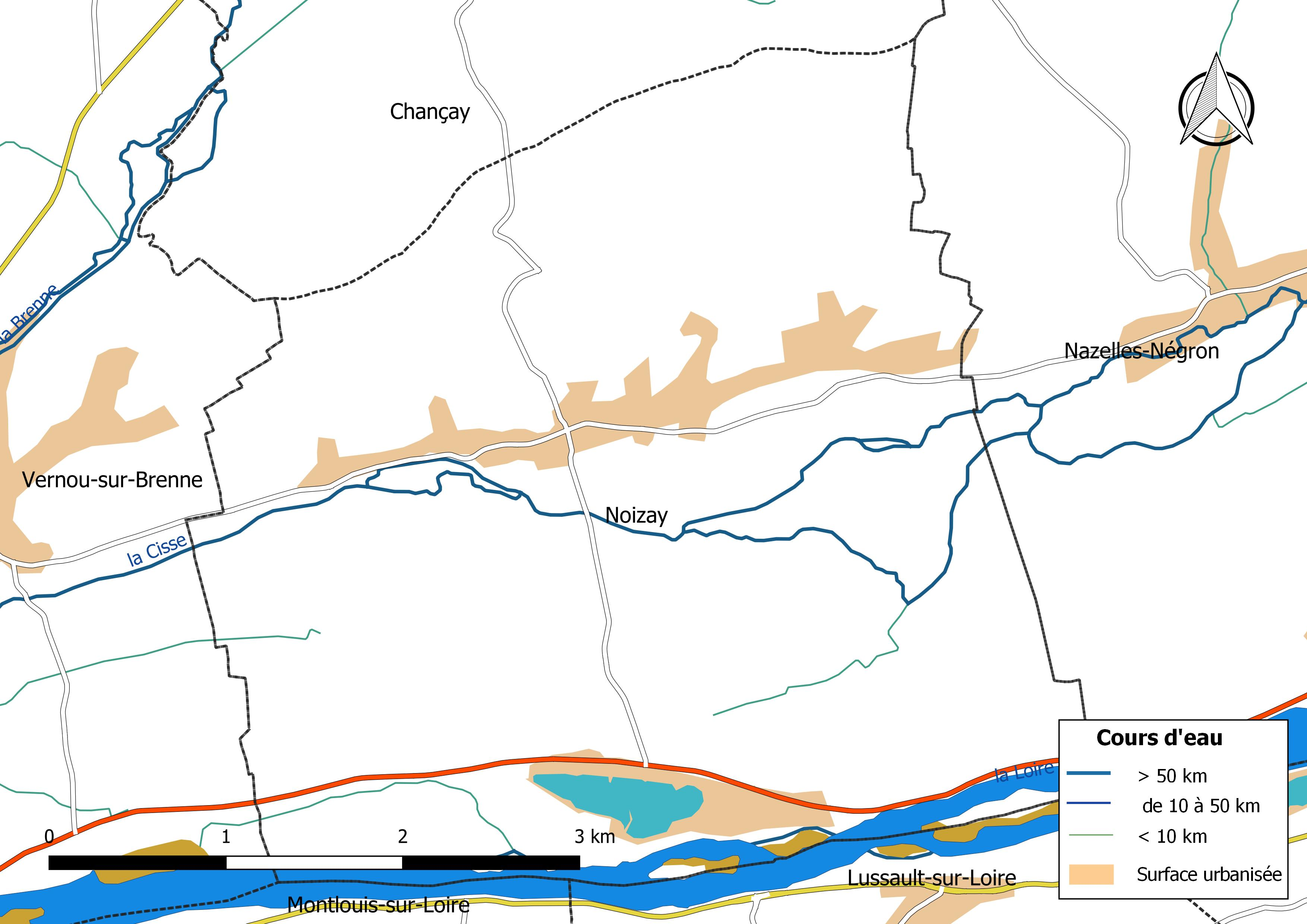 Carte du réseau hydrographique de la commune de Noizay (France).